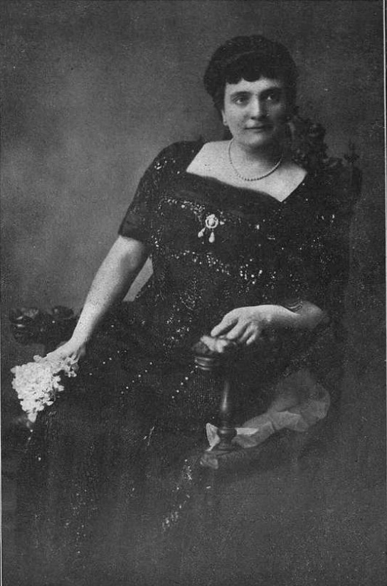 Leonor Sánchez Vicuña1 (1869 — 31 de enero de 1940) fue la cónyuge del presidente chileno Emiliano Figueroa Larraín y, en esa condición, acompañó a su marido durante su mandato en la presidencia de la República de Chile entre 1925 y 1927. Ostentando el cargo protocolar de primera dama de Chile.